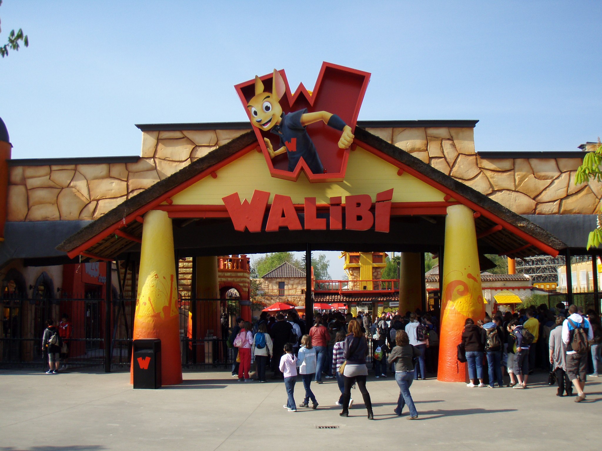 De ingang van het Belgische themapark Walibi Belgium